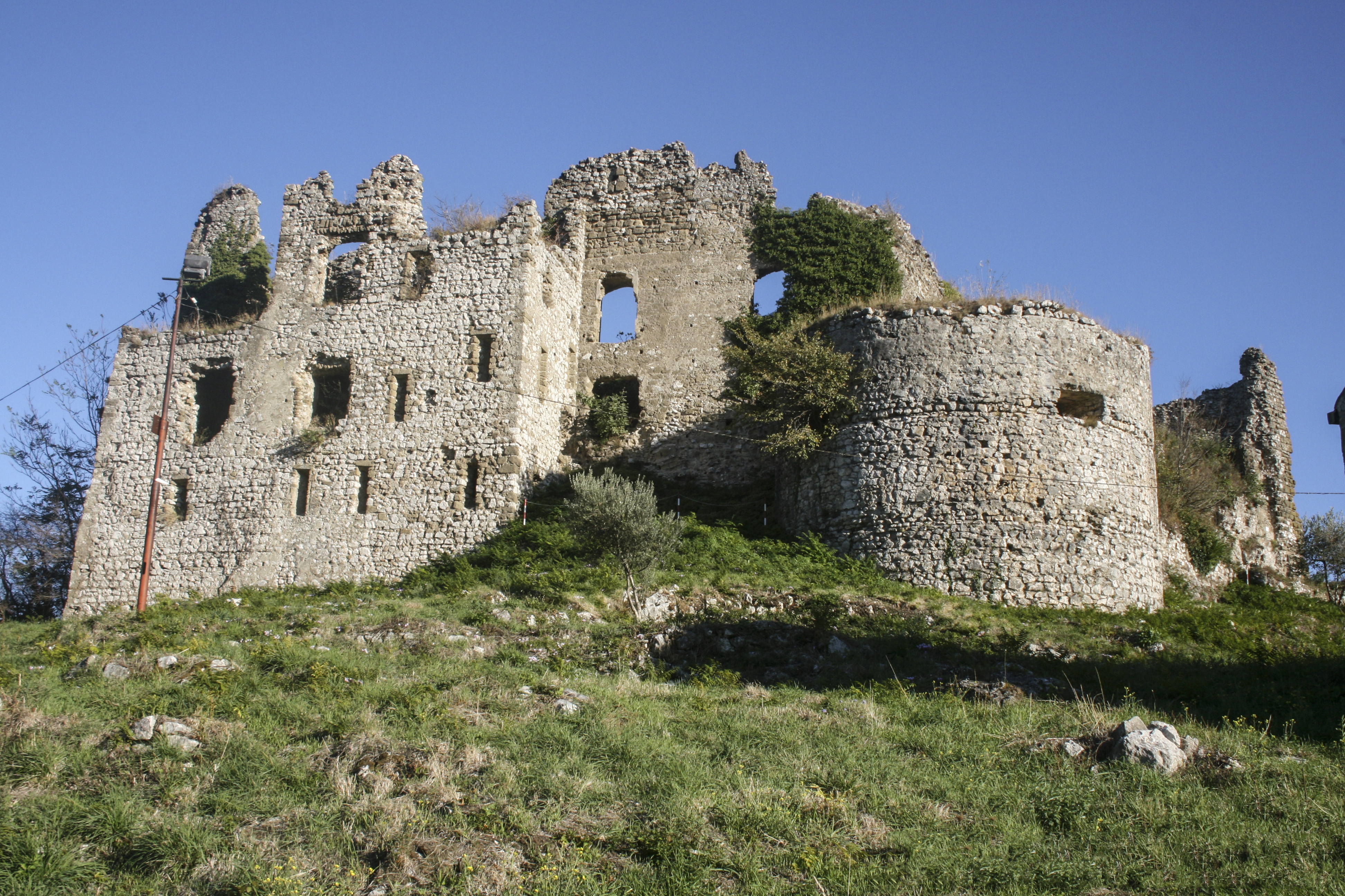 Edificato nel periodo longobardo, il castello di Airola occupa con le sue antiche mura la sommità della collina di Monteoliveto.